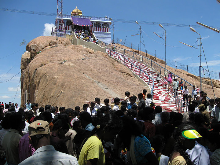 திருச்சி மலைக்கோட்டையில் விநாயகர் சதுர்த்தித் திருவிழா